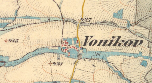 Vojníkov in about 1880